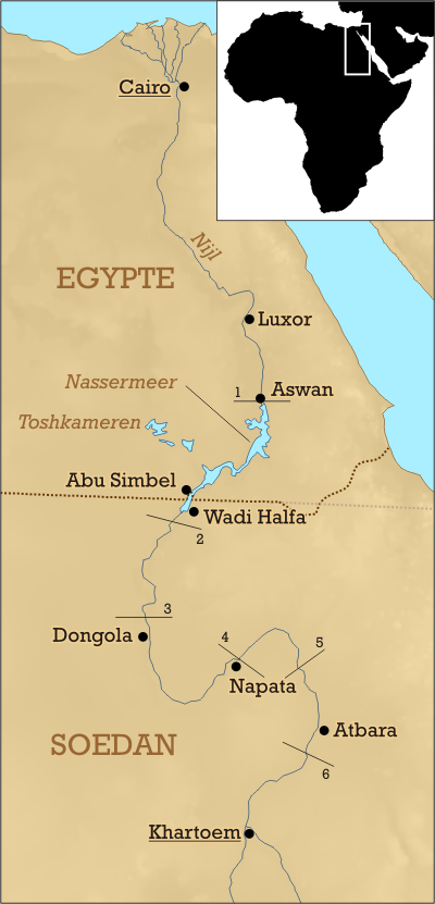 Nubië vandaag de dag. Gemaakt door Mark Dingemanse. Vrijgegeven onder de Creative Commons Naamsvermelding 2.0 licentie.